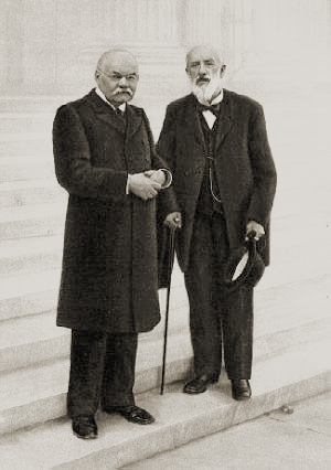 Члены Комитета по устройству Музея изящных искусств и жертвователи на создание Музея